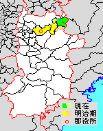 奈良県山辺郡の位置